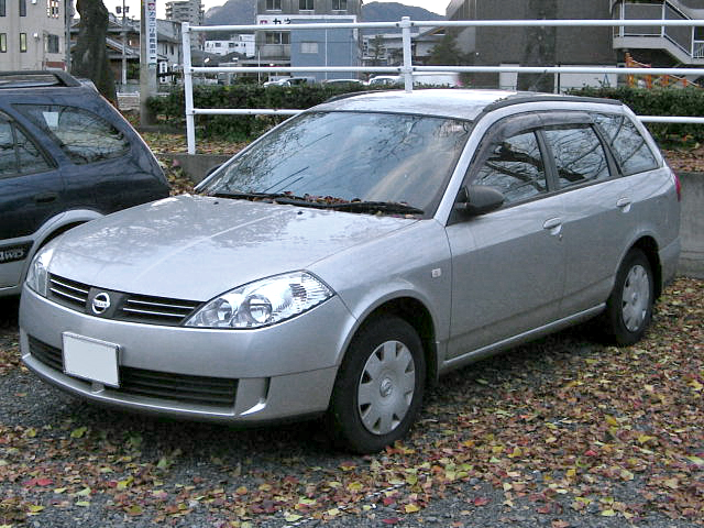 Nissan Wingroad Y11 middle model